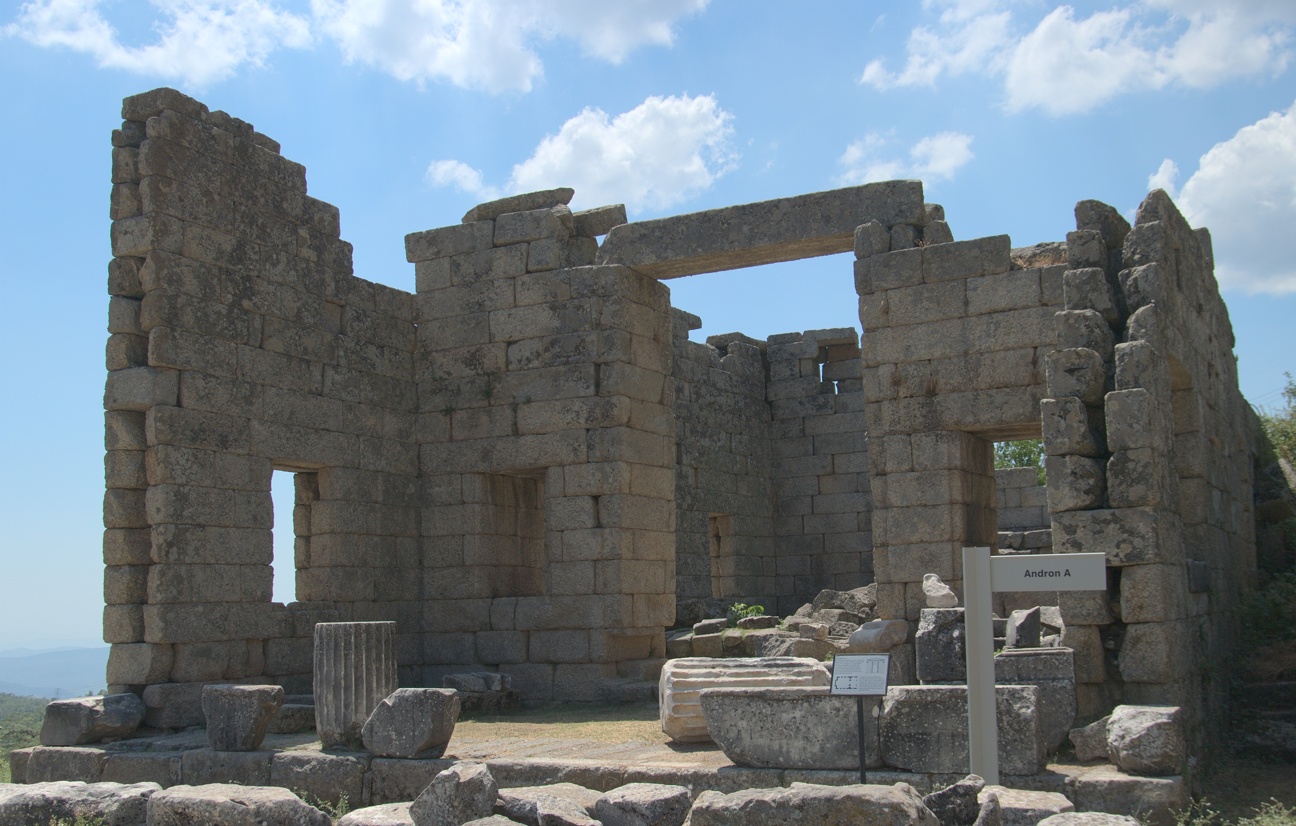 Лабранда. Андрон А